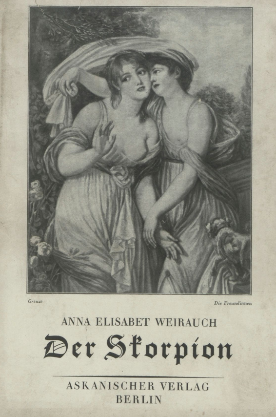 Anna Elisabet Weirauch:Der Skorpion, Band 3, Askanischer Verlag Berlin, 1931 Auf dem Schutzumschlag: Les deux amies, de Jean-Baptiste Greuze